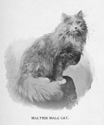 Foto einer Malteserkatze, 1898 aus "The Angora Cat". Blau-Graue Malteserkatze